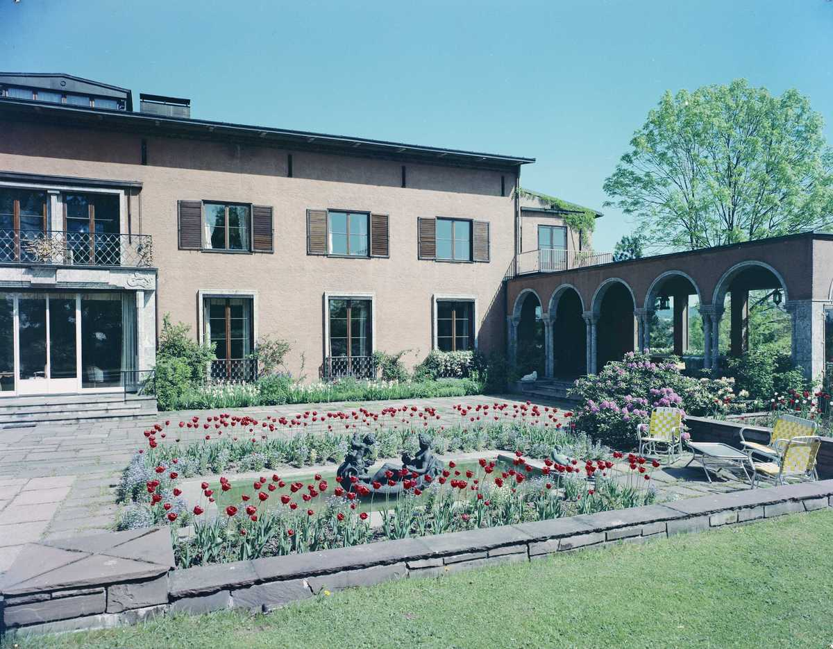 Villa Smedbråten på Bygdøy. Oppført for Johan H. Andresen, Hengsengveien 1, Oslo, 1935. Arkitekt: Arnstein Arneberg.